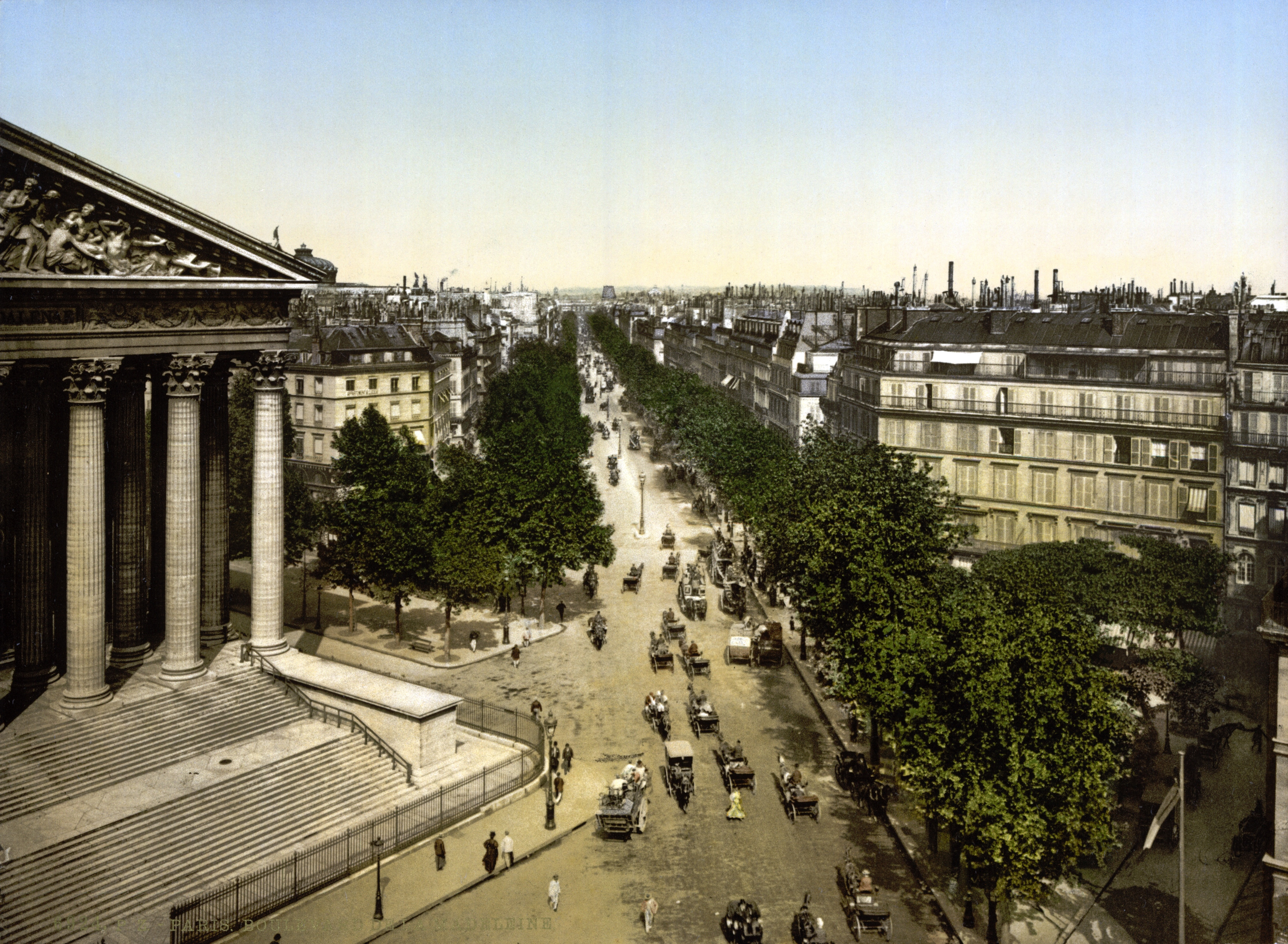 Boulevard de la Madeleine with the Church de la Madeleine on the left, Paris.